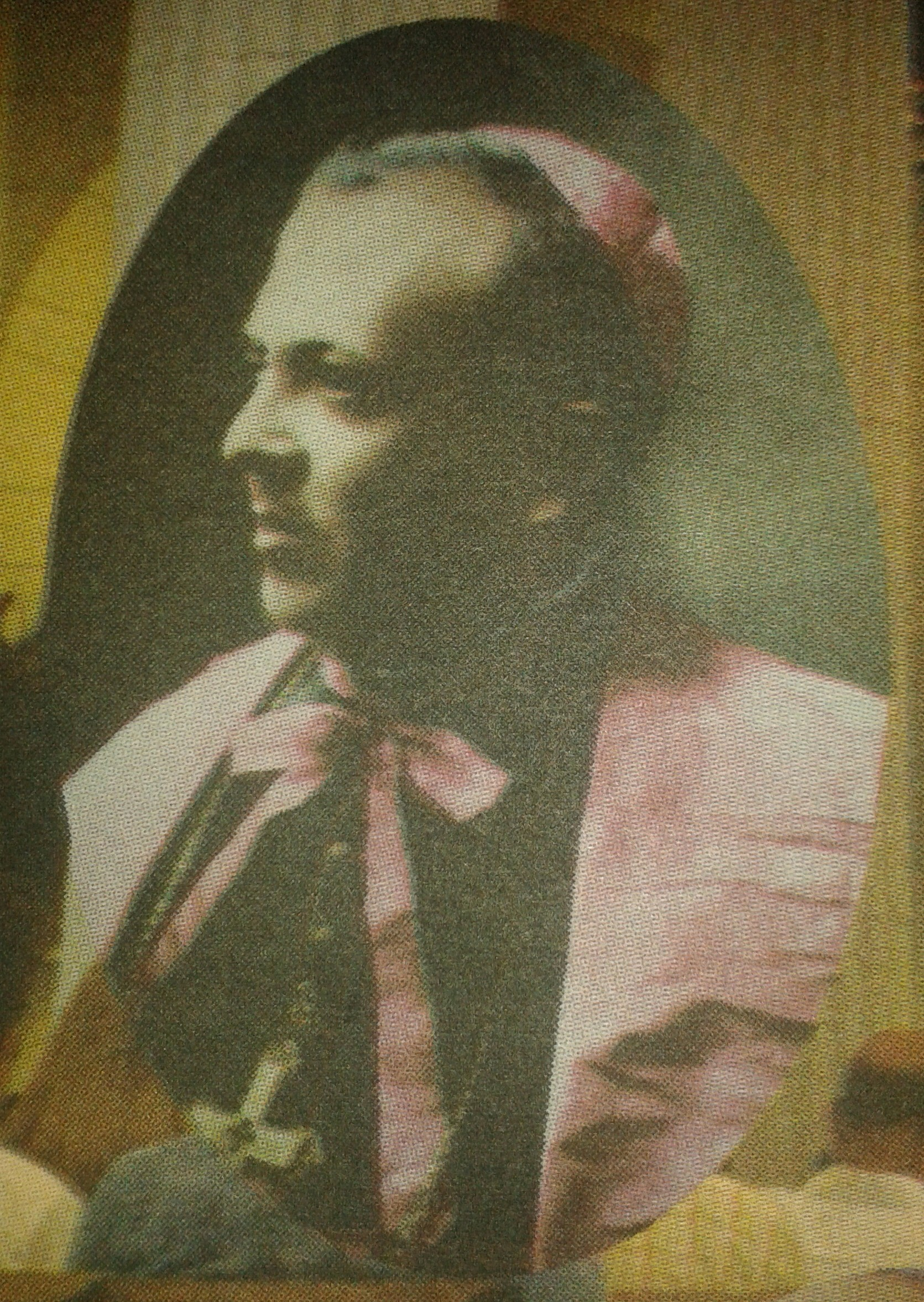 foto oficial